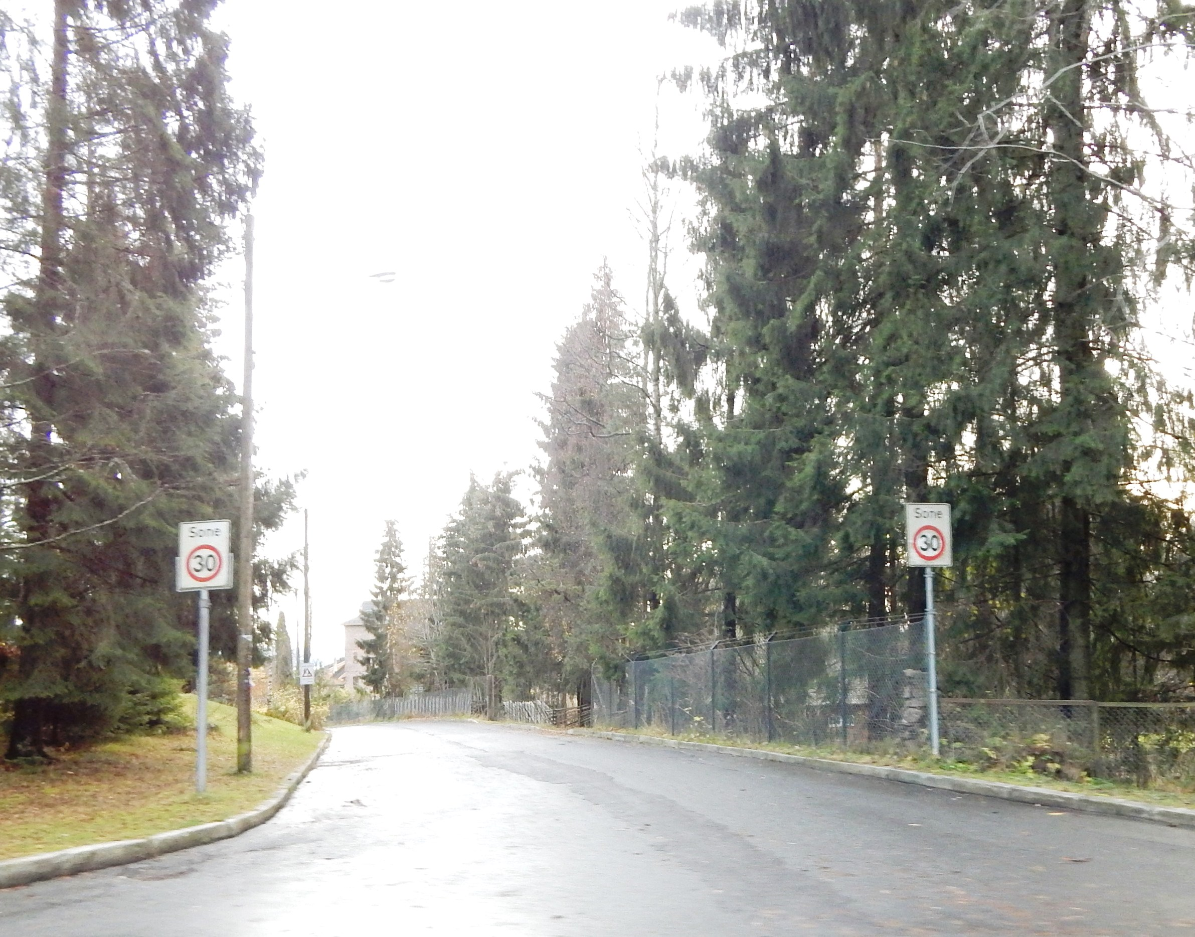 Kristianiasvingen